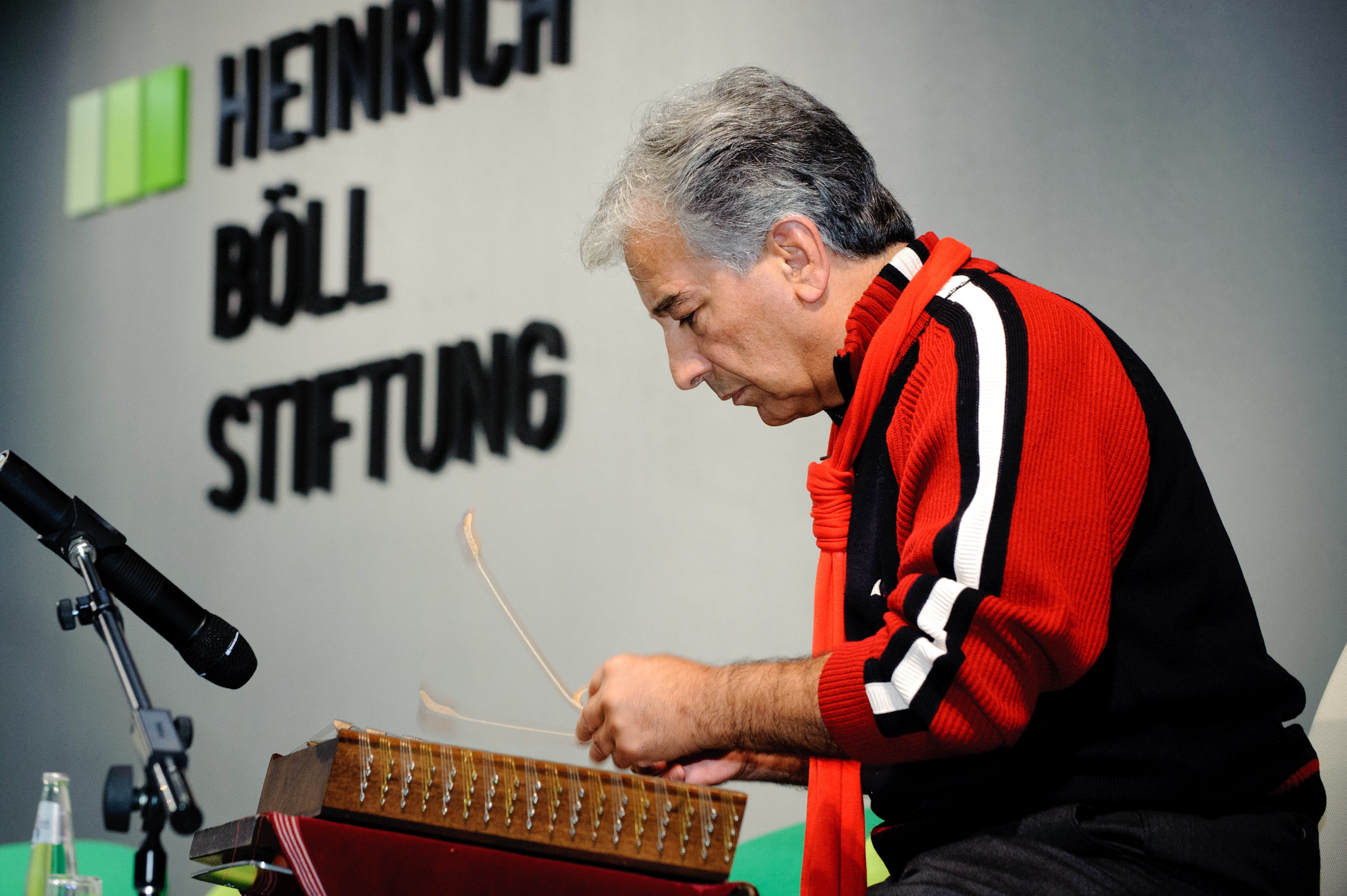 Prof. Nasser Kanani, spielt das Satur